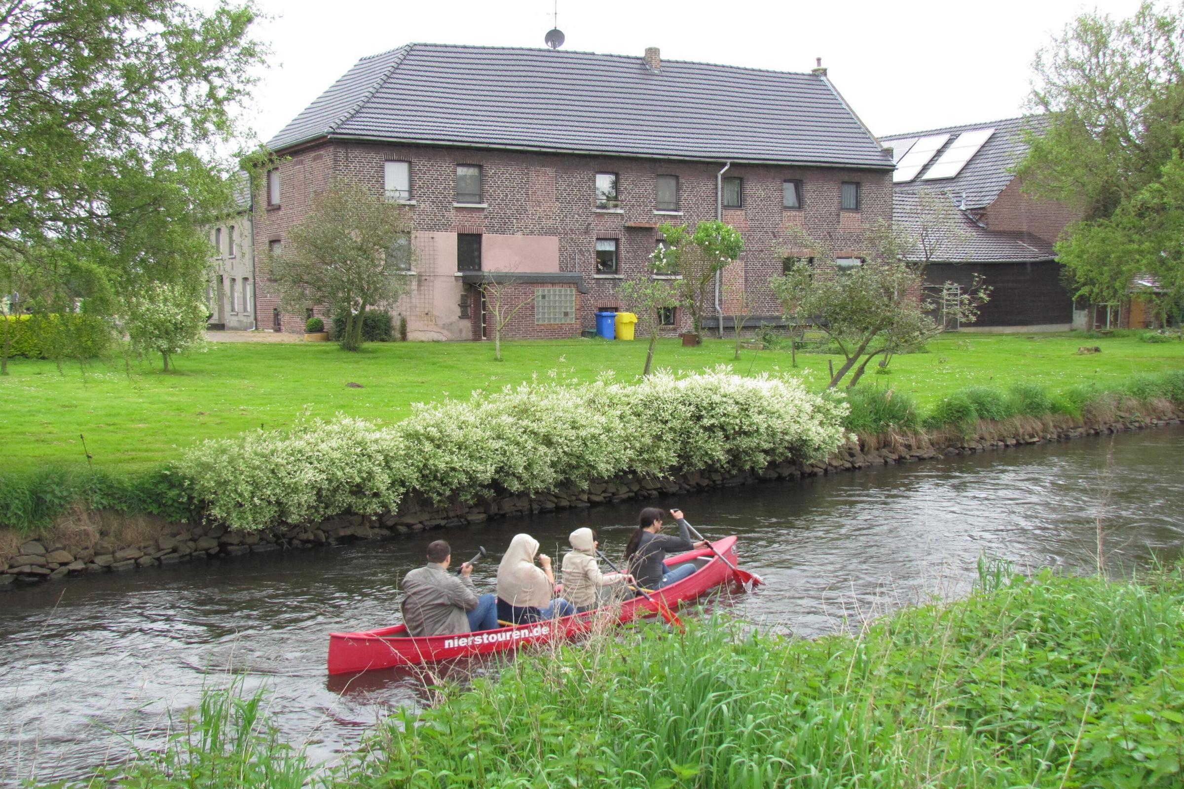 Die Langendonker Mühle mit Niersverlauf